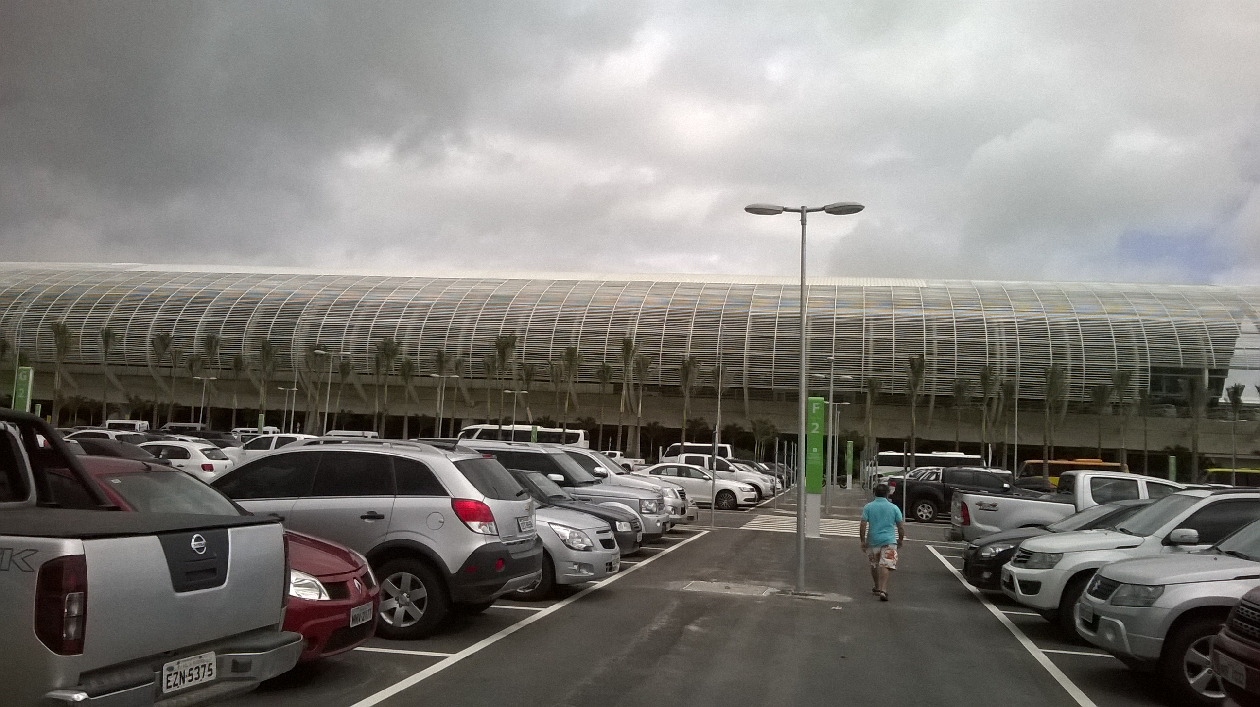 Airport International São Gonçalo do Amarante (Natal, RN, Brasil)